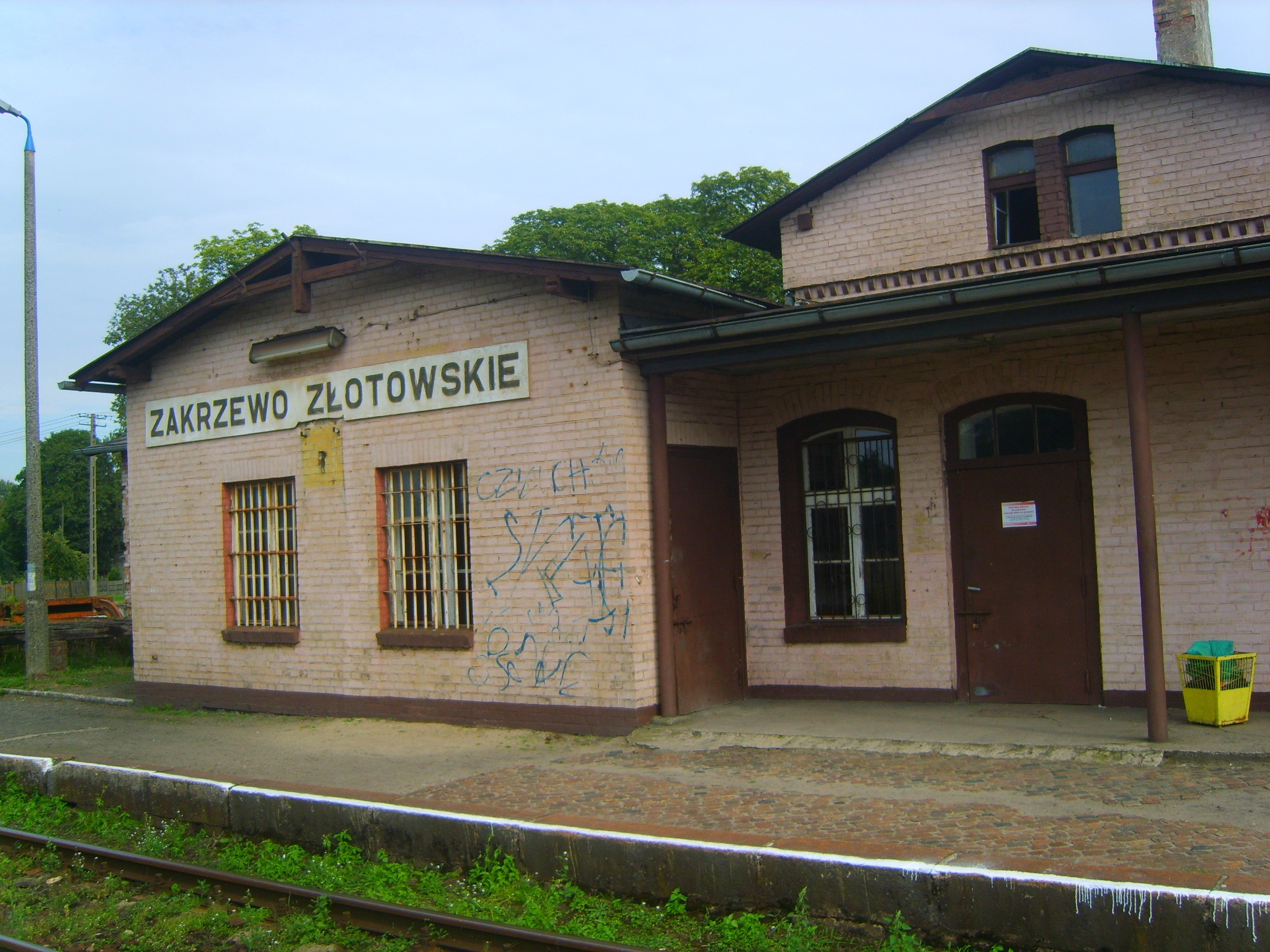 Przystanek kolejowy w Zakrzewie.